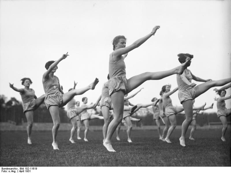 Moderner deutscher Frauensport! In der Logis-Schule in Hannover werden Frauen und Mädchen durch rythmischen Sport zu moderner Körper-Ertüchtigung ausgebildet. Früh um 8 Uhr beginnen bei schönem Wetter die rythmischen Uebungen im Tanzen und Springen, um dem Körper Grazie und Anmut zu verleihen. Rythmischer Tanz der Logis-Schülerinnen, welcher den Körper elastisch erhält.